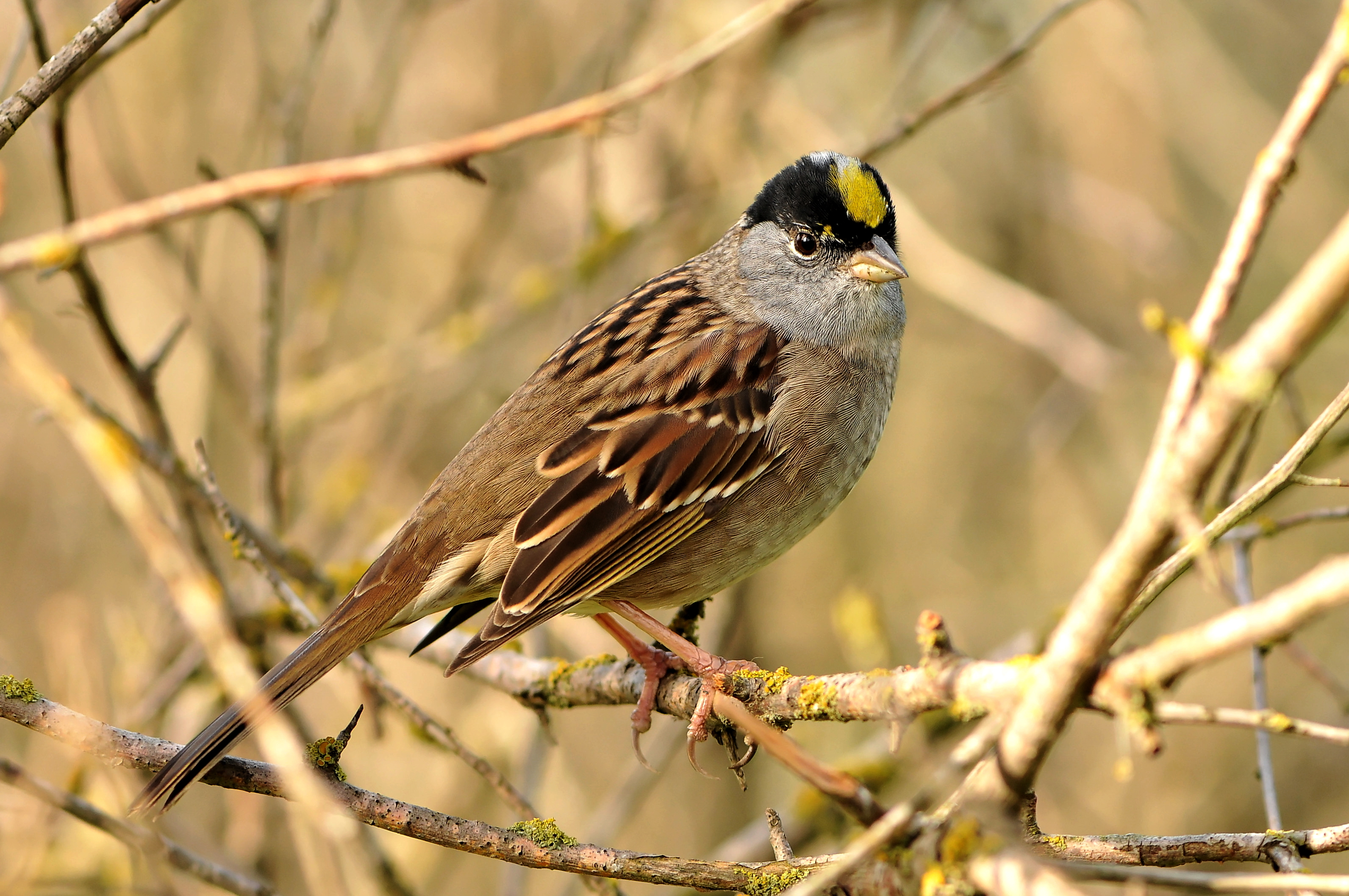 Zonotrichia atricapilla